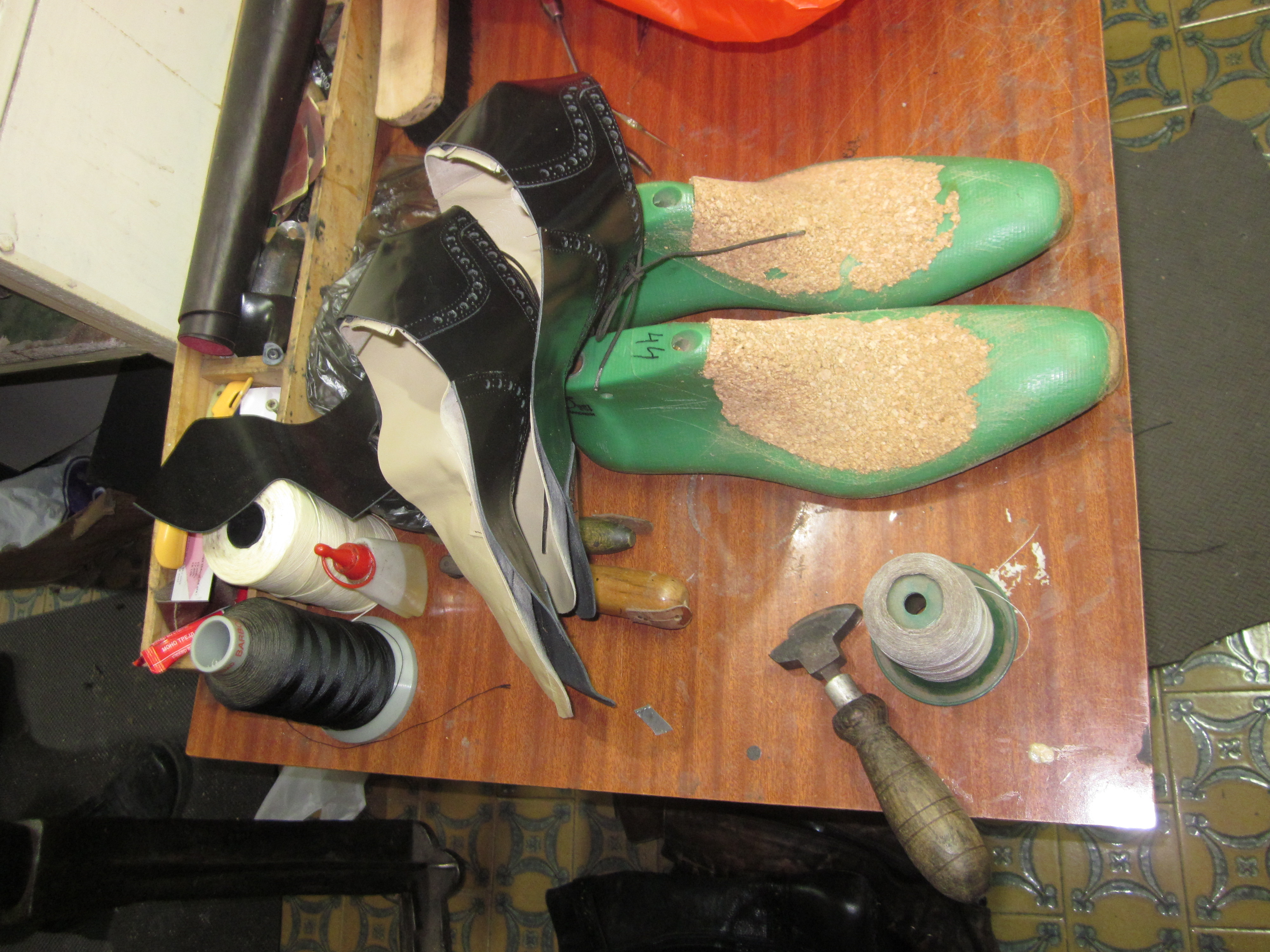 Чевлар